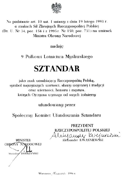 9 PLM - dokument nadania sztandaru. Autor skanu: Joymaster